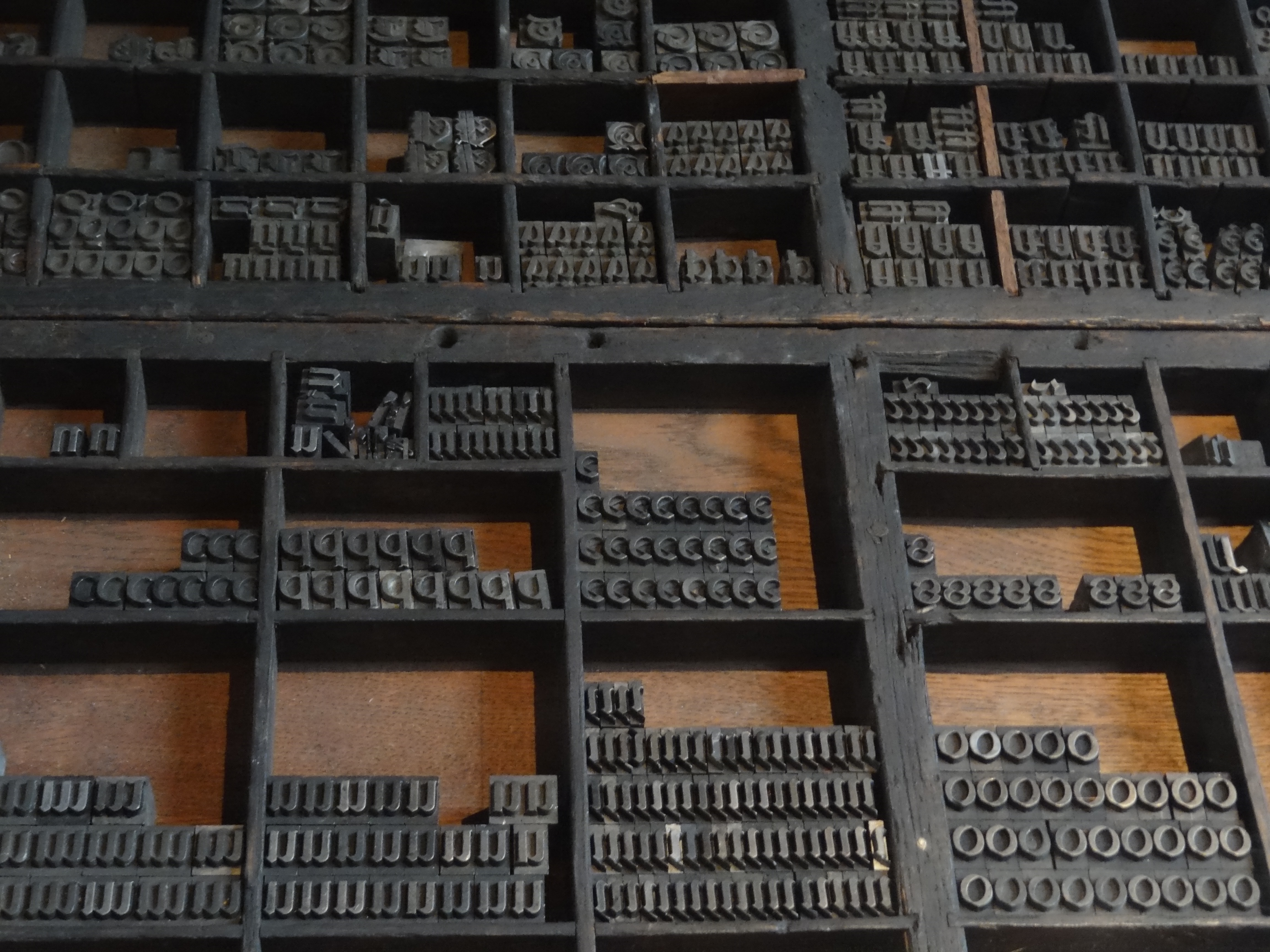 Museum Plantin-Moretus - Antwerpen